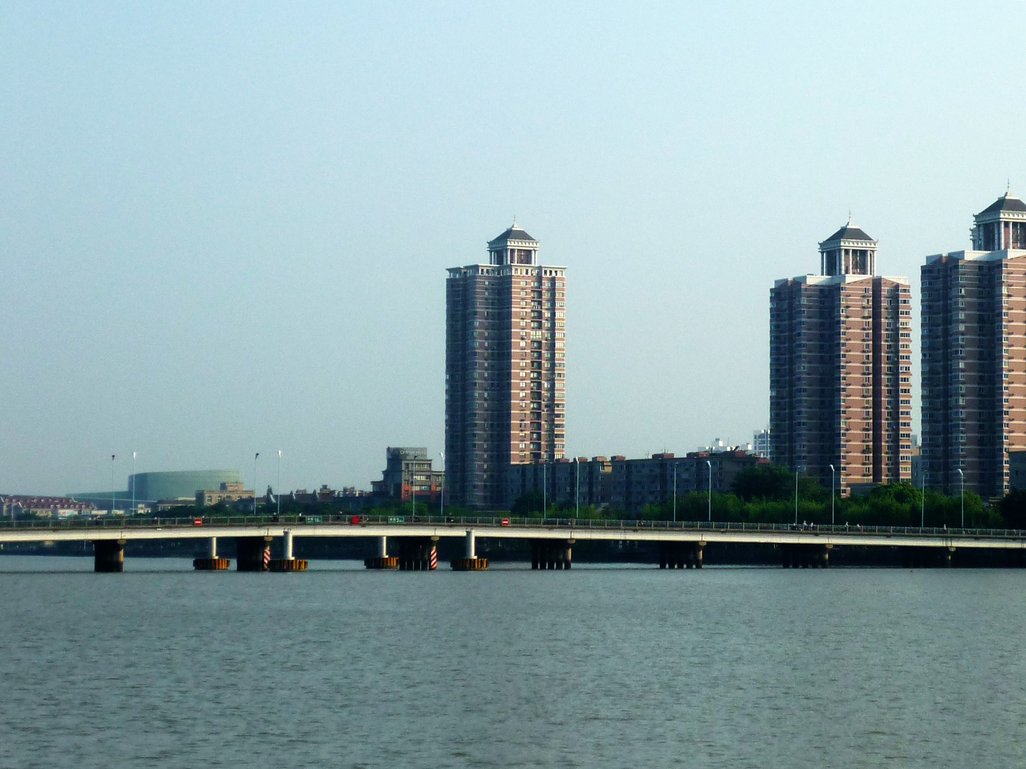 宁波解放桥